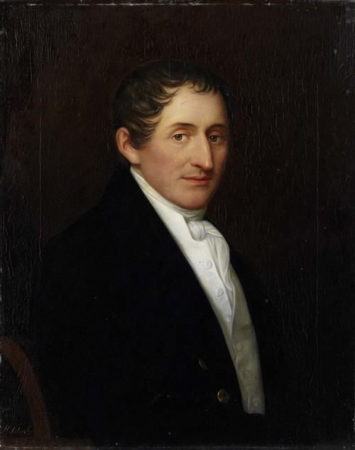 Zu den Kunstwerken aus der Provenienzforschung des Niedersächsischen Landesmuseums Hannover zählt dieses Werk aus der Hand des hannoverschen Zeichenlehrers Heinrich Schulz (auch: Peter Heinrich Andreas Schultze, genannt Schulz, 1797-1886). Das Bildnis, Öl auf Leinwand in den Maßen 65,7 x 53,5 cm aus dem Jahr 1841, zeigt ein Brustbild eines Herren, zu dem auch ein weiteres Gemälde mit der Abbildung einer Dame gehörte. Die Stücke aus dem Besitz eines „Frl. C. Hink“ gelangte durch Vermittlung des hannoverschen Kunsthändlers Emil Backhaus während der Zeit des Nationalsozialismus im Jahr der Reichspogromnacht 1938 in den Besitz des Museums. Das Museum bittet auf seiner Seite um hilfreiche Mitwirkung zur Klärung der Provenienz ...